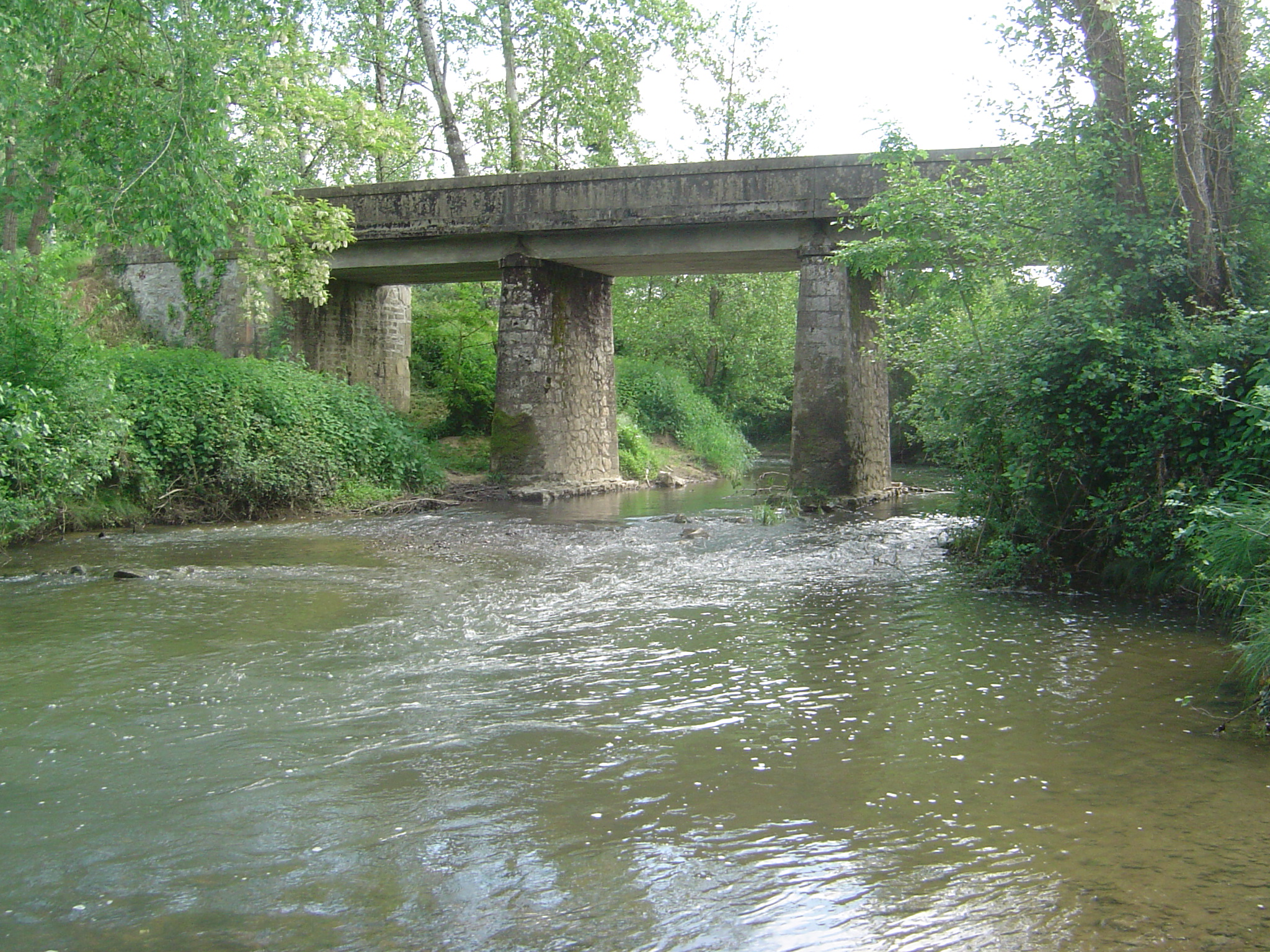 Pont suu Los, enter Larbei e Caupena ; Gasconha